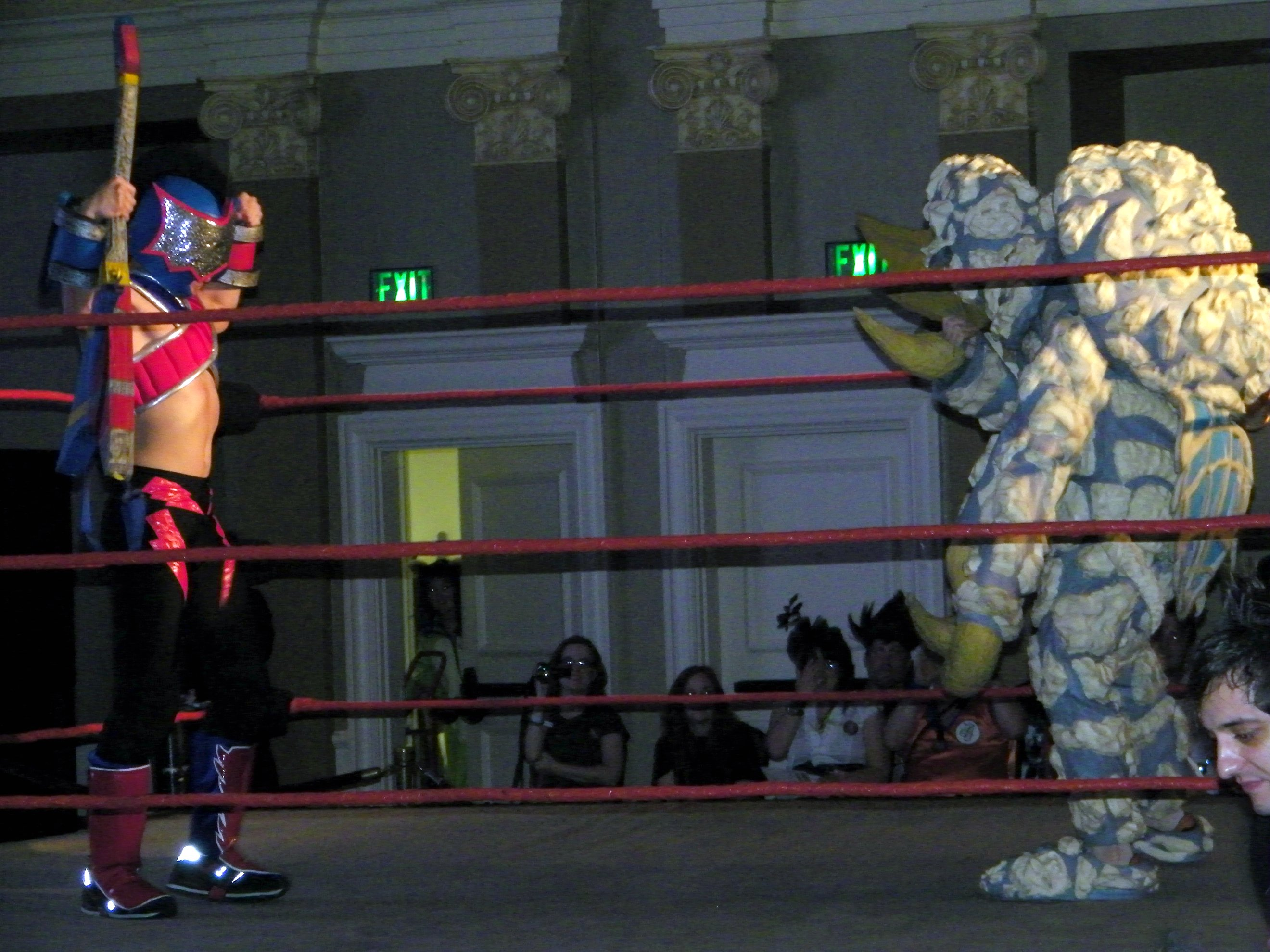 Metal Wing Black vs Yarsminko (Kaiju Big Battel) @ MTAC '10